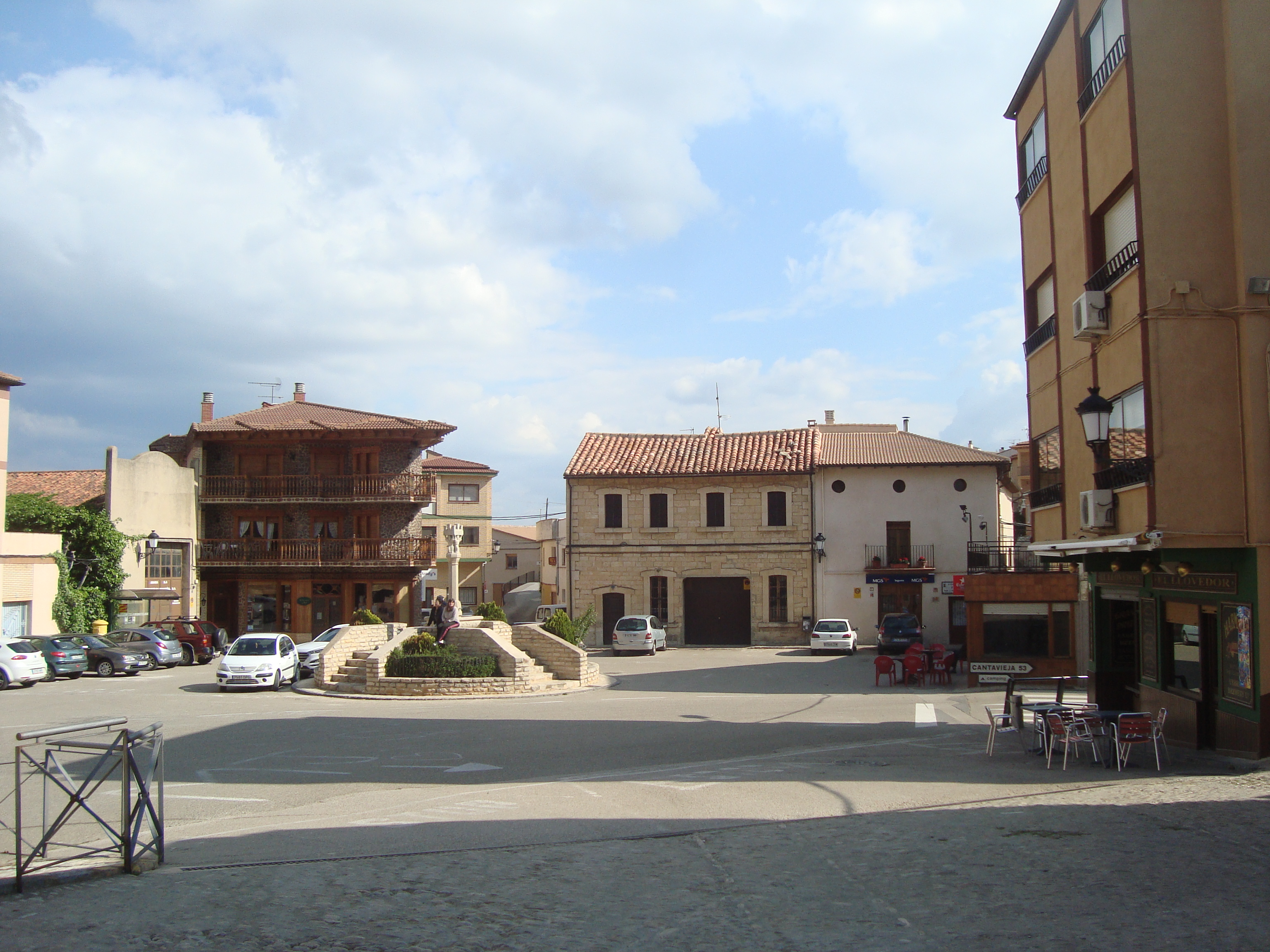 Castellote, Teruel (Aragón)